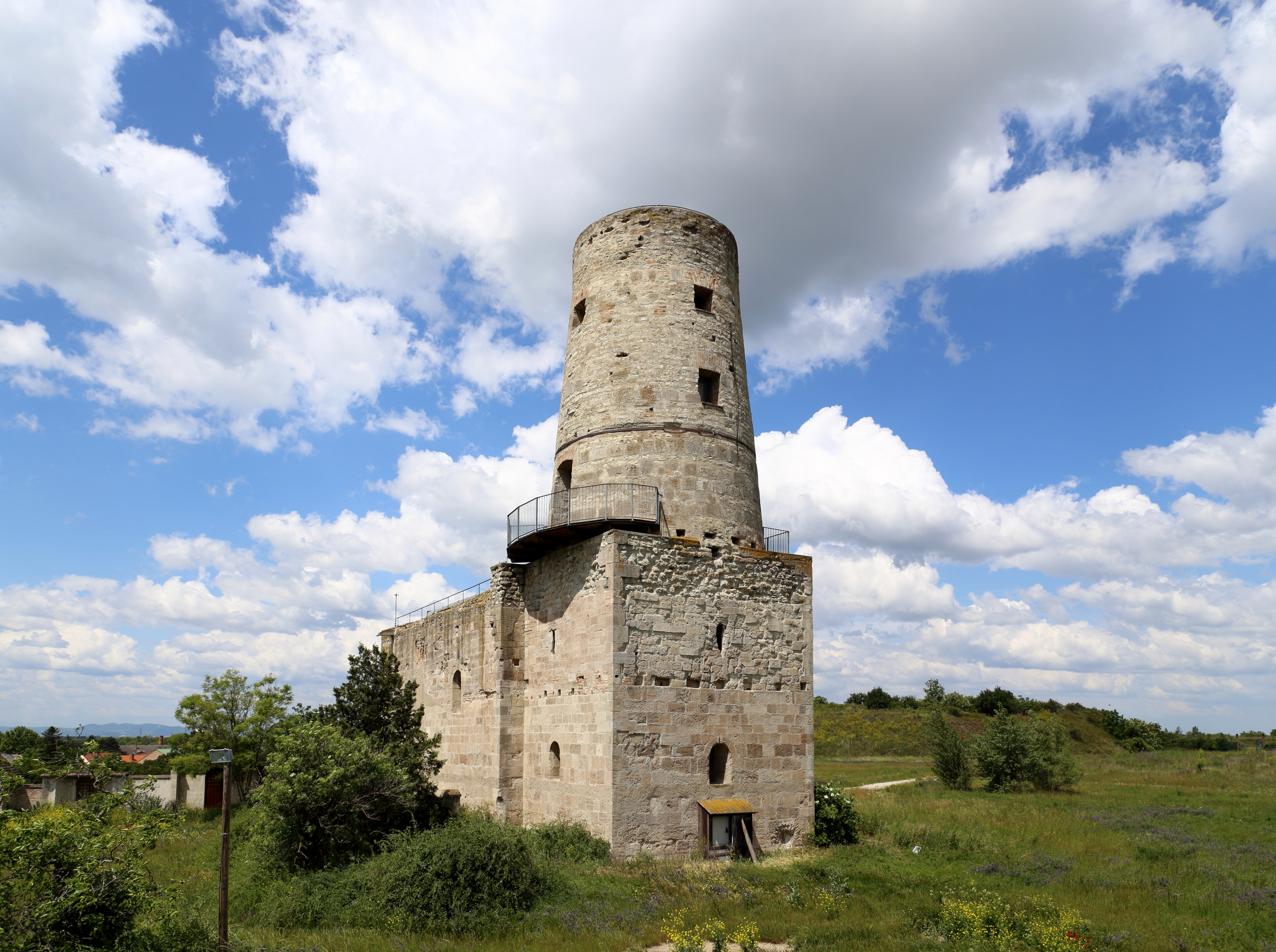 Südostansicht der Kirchenruine hl. Martin in der niederösterreichischen Gemeinde Markgrafneusiedl. Die am nordöstlichen Ortausgang in beherrschender Höhenlage errichtete (Ende des 12. Jahrhunderts) ehemalige Wehrkirche wurde 1574 als Wallfahrtskirche bezeichnet und 1683 urkundlich als Ruine genannt. Bei der Schlacht bei Wagram 1809 diente sie den Österreichern unter Erzherzog Karl als Kommandositz. 1817 wird sie zu einer Windmühle mit dominierendem Rundturm umgebaut und brannte 1862 aus.